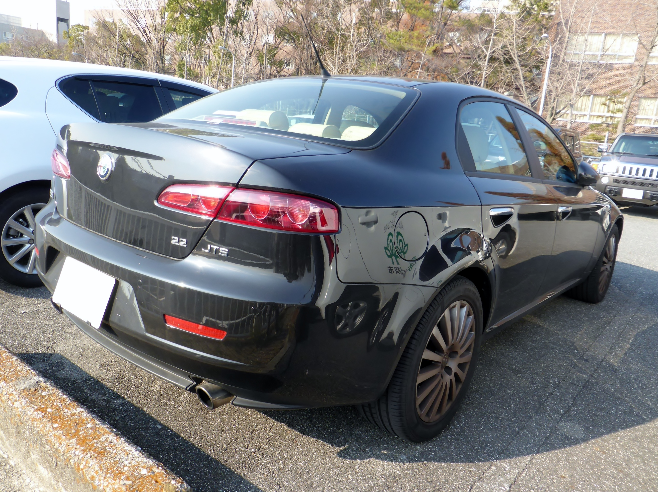 ABA-93922型アルファ・ロメオ159 2.2 JTS ヴィラデステをリアから撮影。